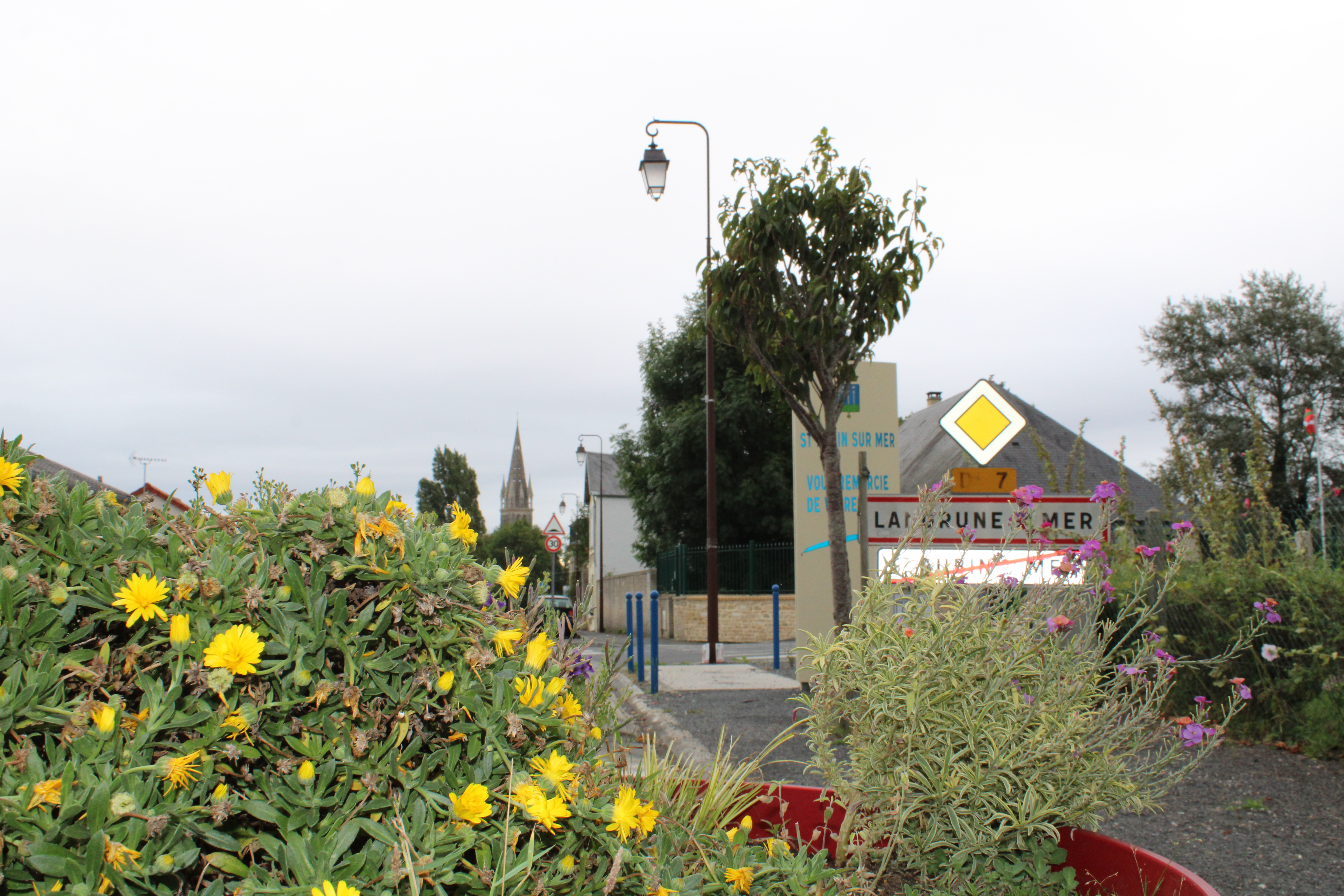 Entrée de la ville